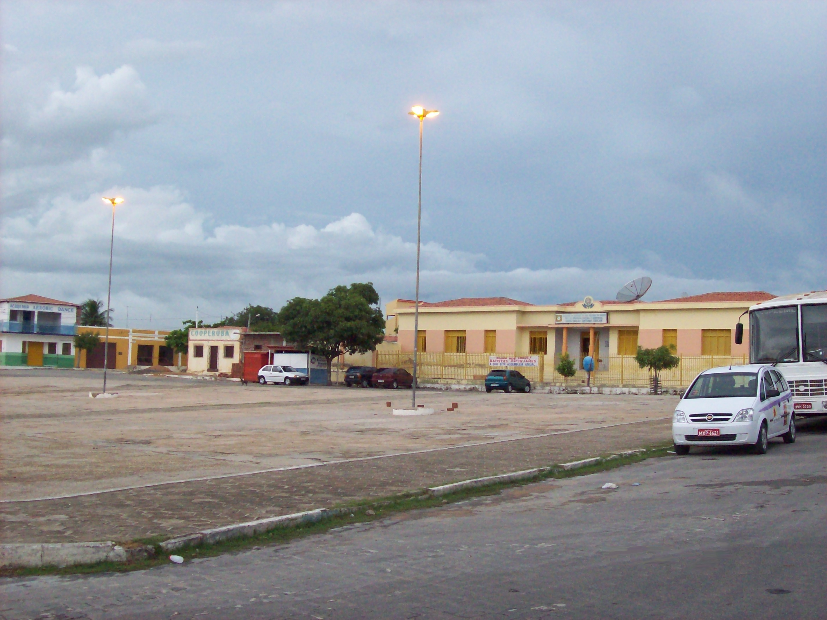 Cemitério de Caraúbas